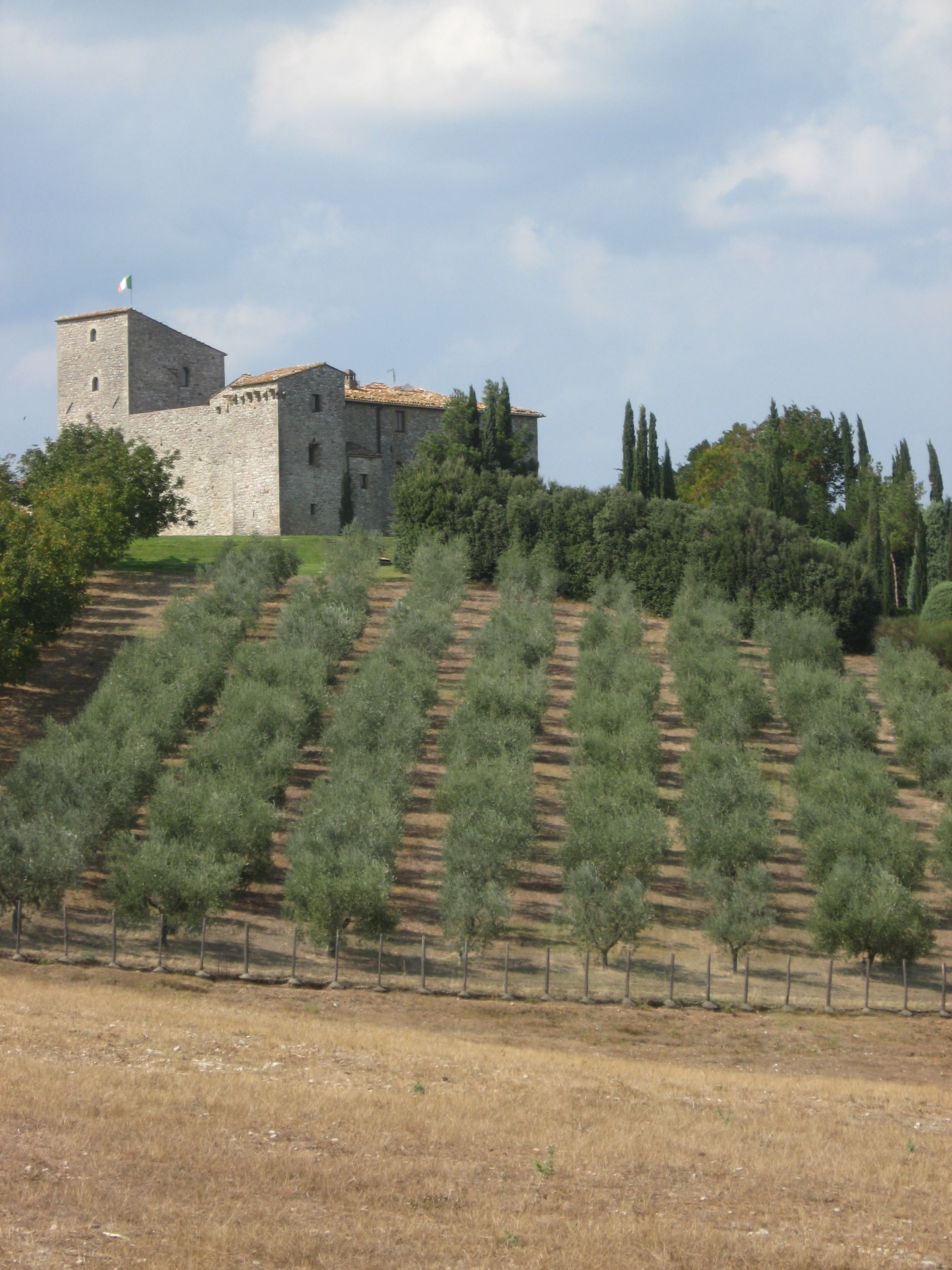 Todi Castle olive trees in Umbria - Italia.